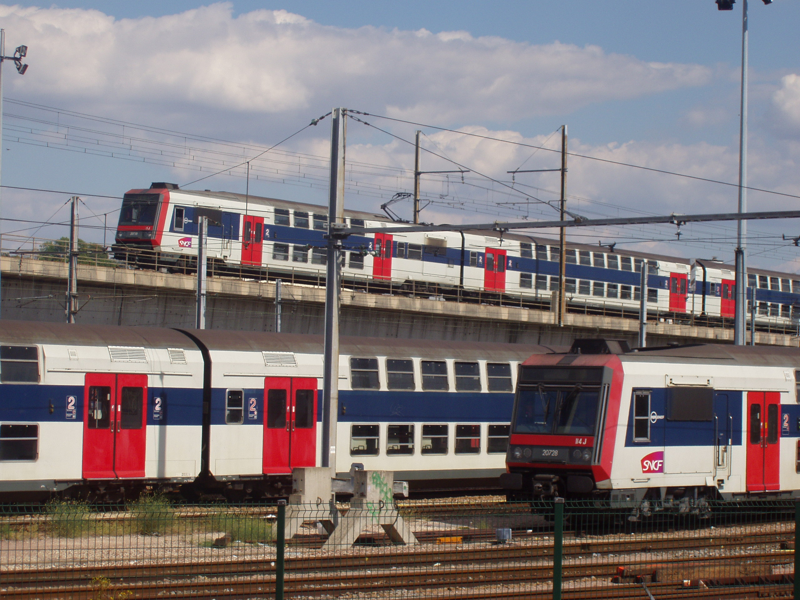 Rames automotrices Z 20500 à Corbeil-Essonnes, Essonne (91), France